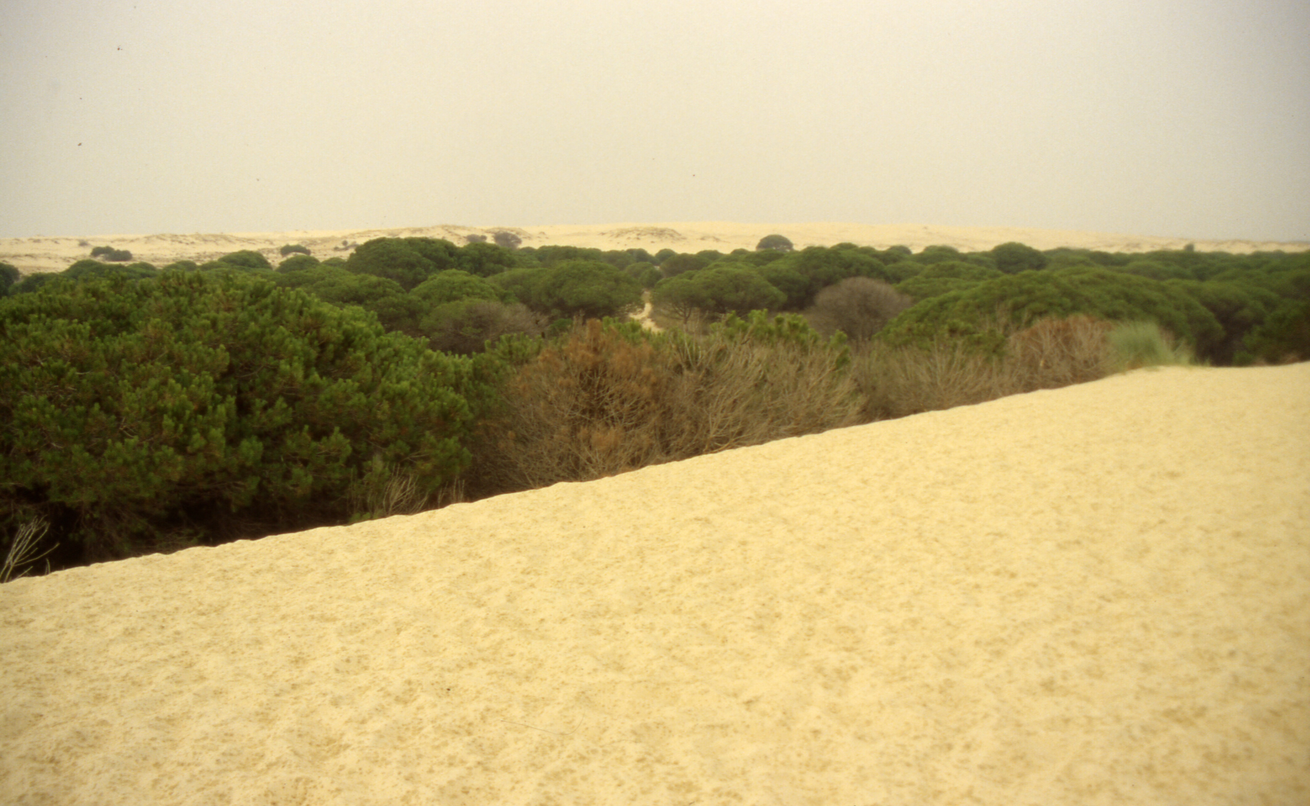 Donana Dünen